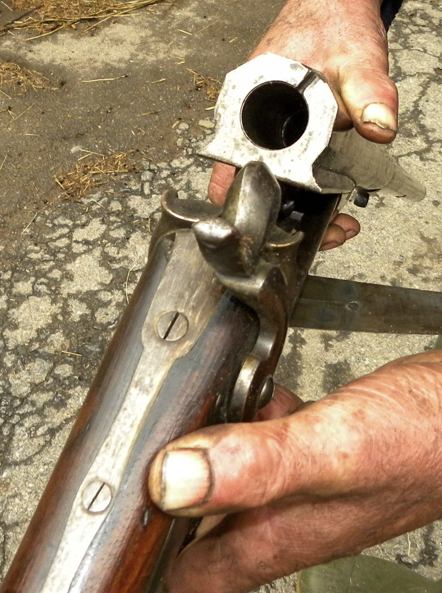 Calibre4 Lefauxcheux à broches